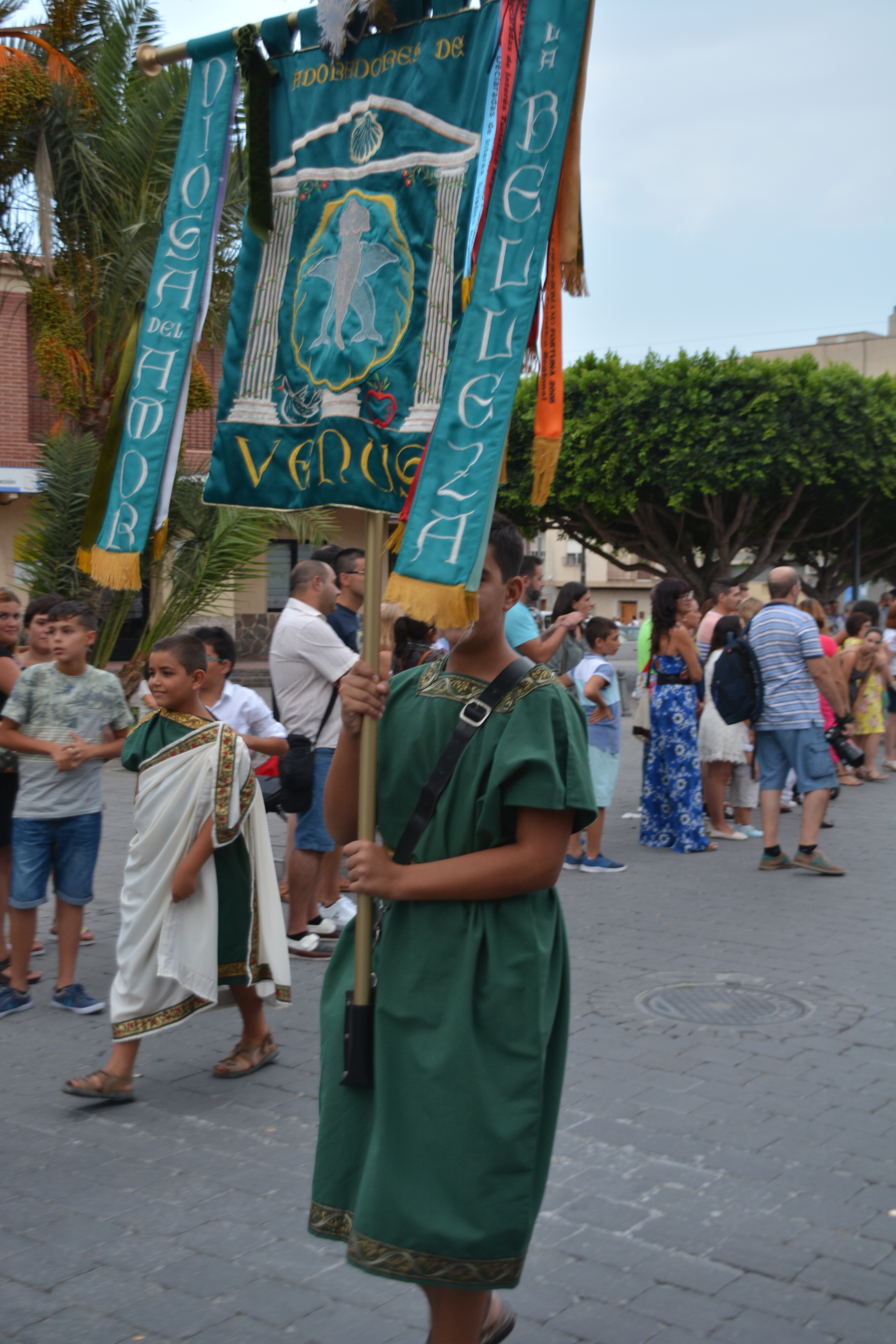 Fiestas de Sodales Ibero-Romanos This is a photography of a Folklore festival in Spain (Wikidata id Q23660934).